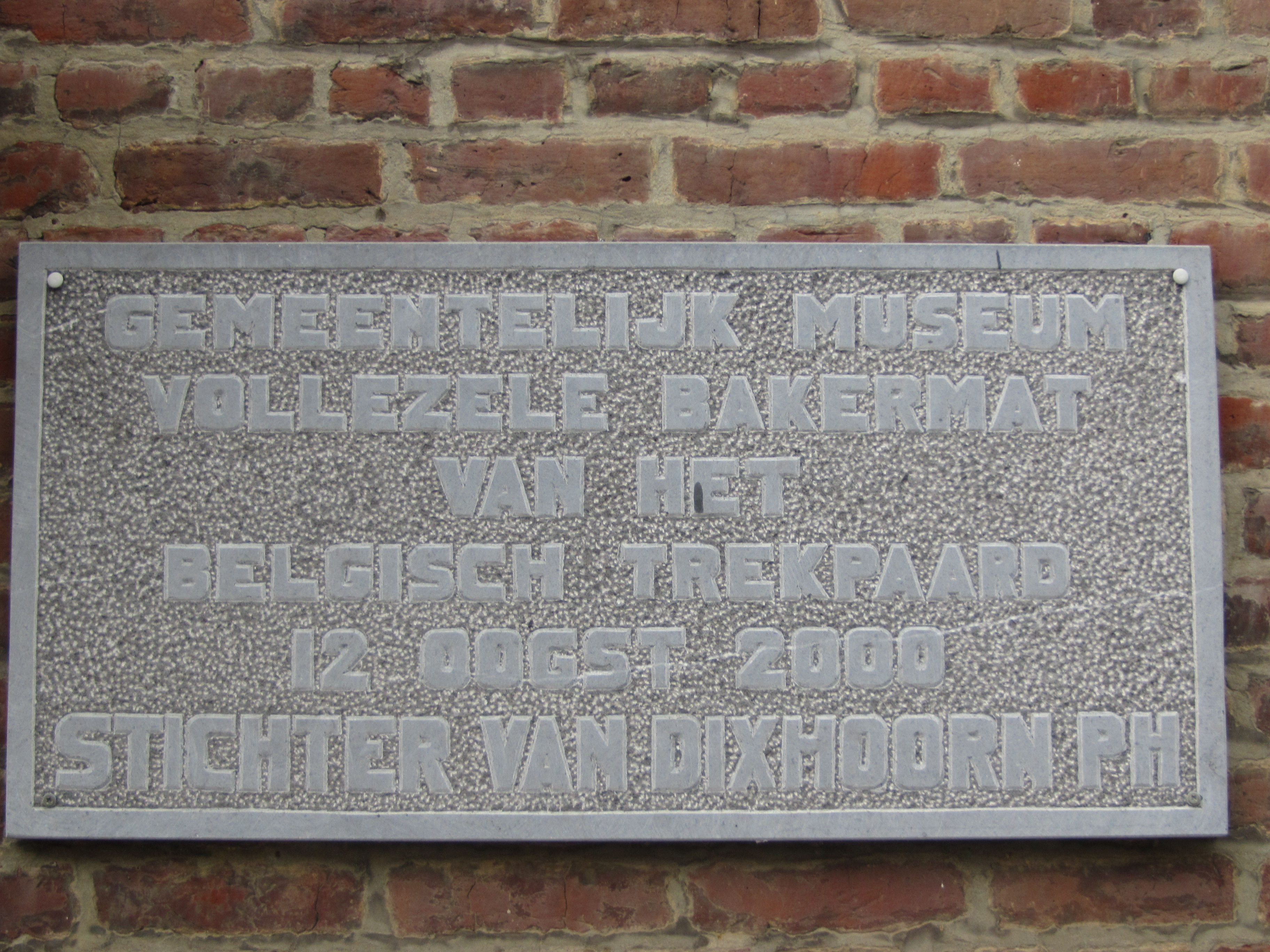 Gedenksteen aan de gevel van het Museum van het Belgisch Trekpaard, gelegen aan het Oudstrijdersplein 4 te 1570 Vollezele, ter herinnering van de opening van het museum op 12 augustus 2000